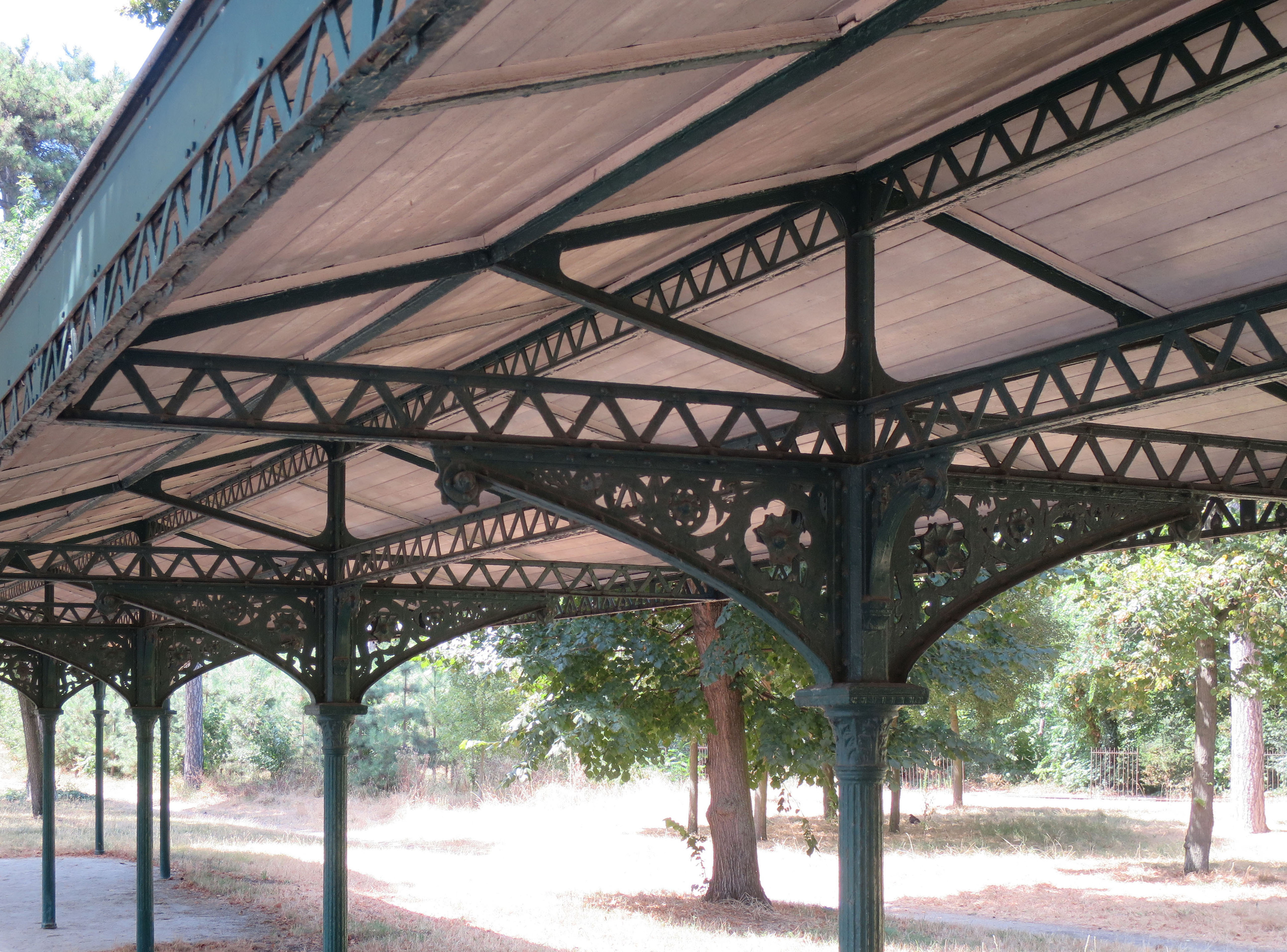 Historisches Bahnsteigdach von 1878, Detail